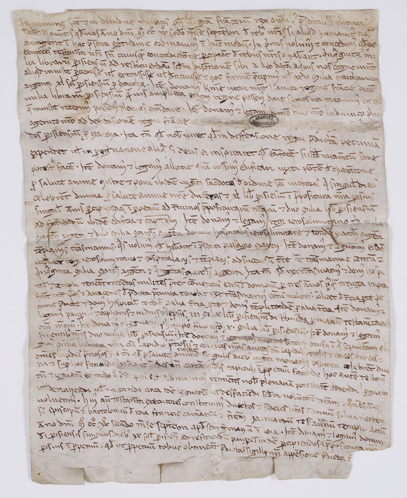 Testament de Philippe Auguste donné à Saint-Germain-en-Laye, septembre 1222. La forme adoptée est celle du testament mystique, clos au moyen d'un système d'entailles ménagées dans le parchemin afin d'y faire passer les bandes repliées du support, sous le sceau (disparu): l'ouverture du document suppose de ce fait la destruction du système de clôture. Ce dispositif est repris pour le testament de Louis VIII (AE II 223).